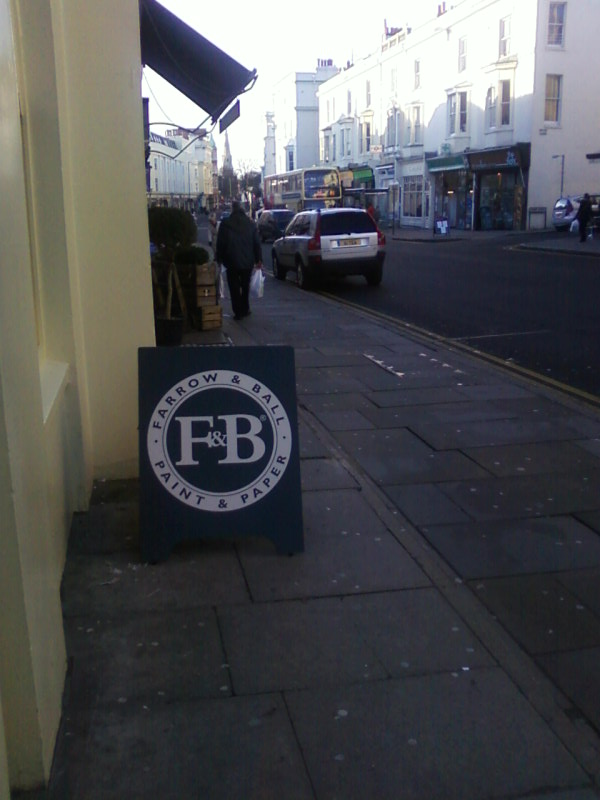 Рекламный штендер.